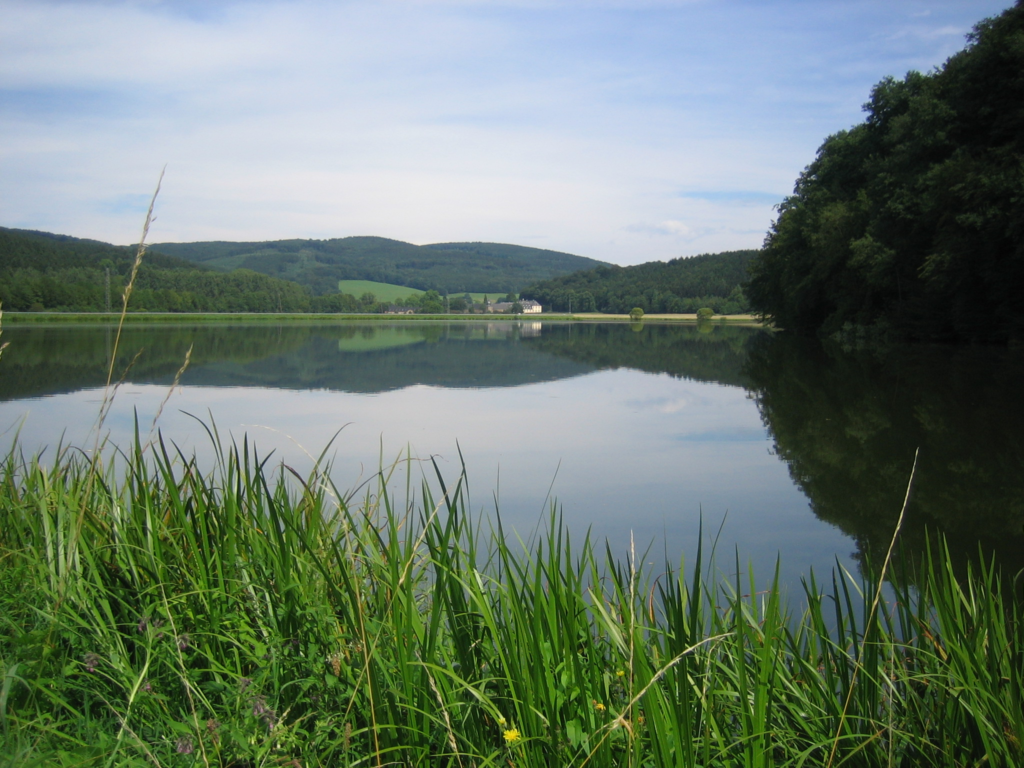 Stausee Ehreshoven II, Engelskirchen